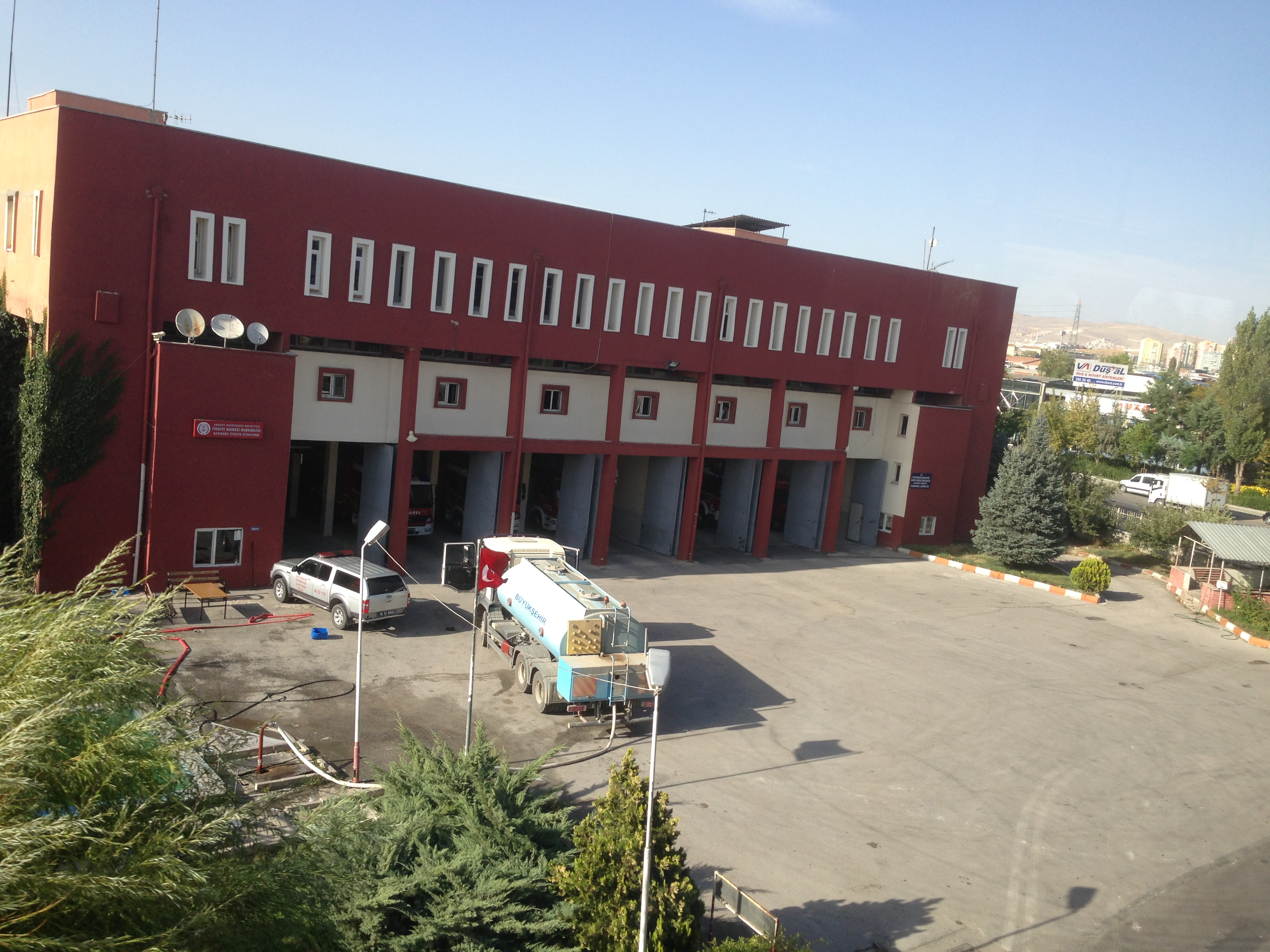 Ankara Yenimahalle Batıkent İtfaiye İstasyonu